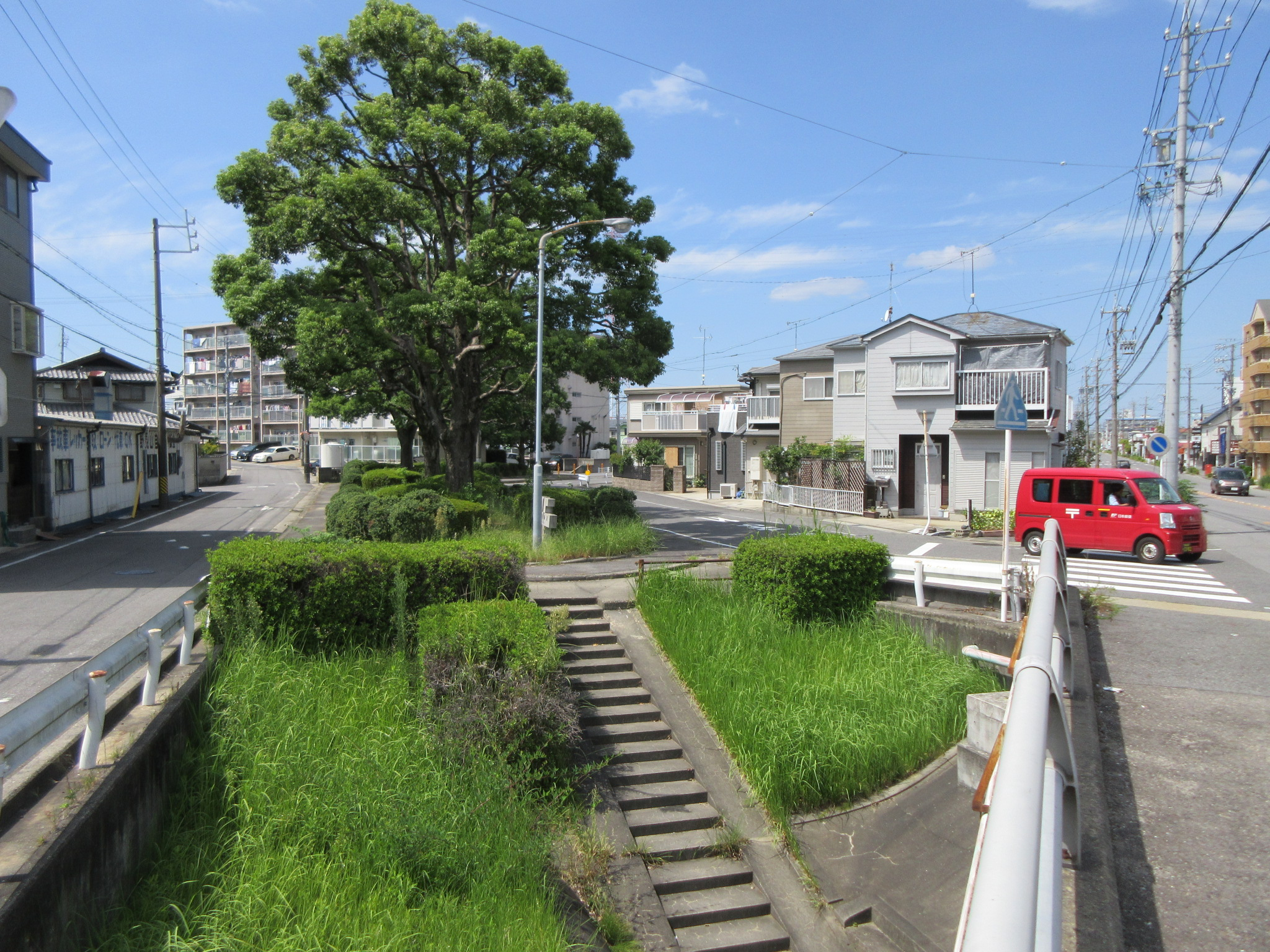 明治川緑道（岡崎市日名本町）